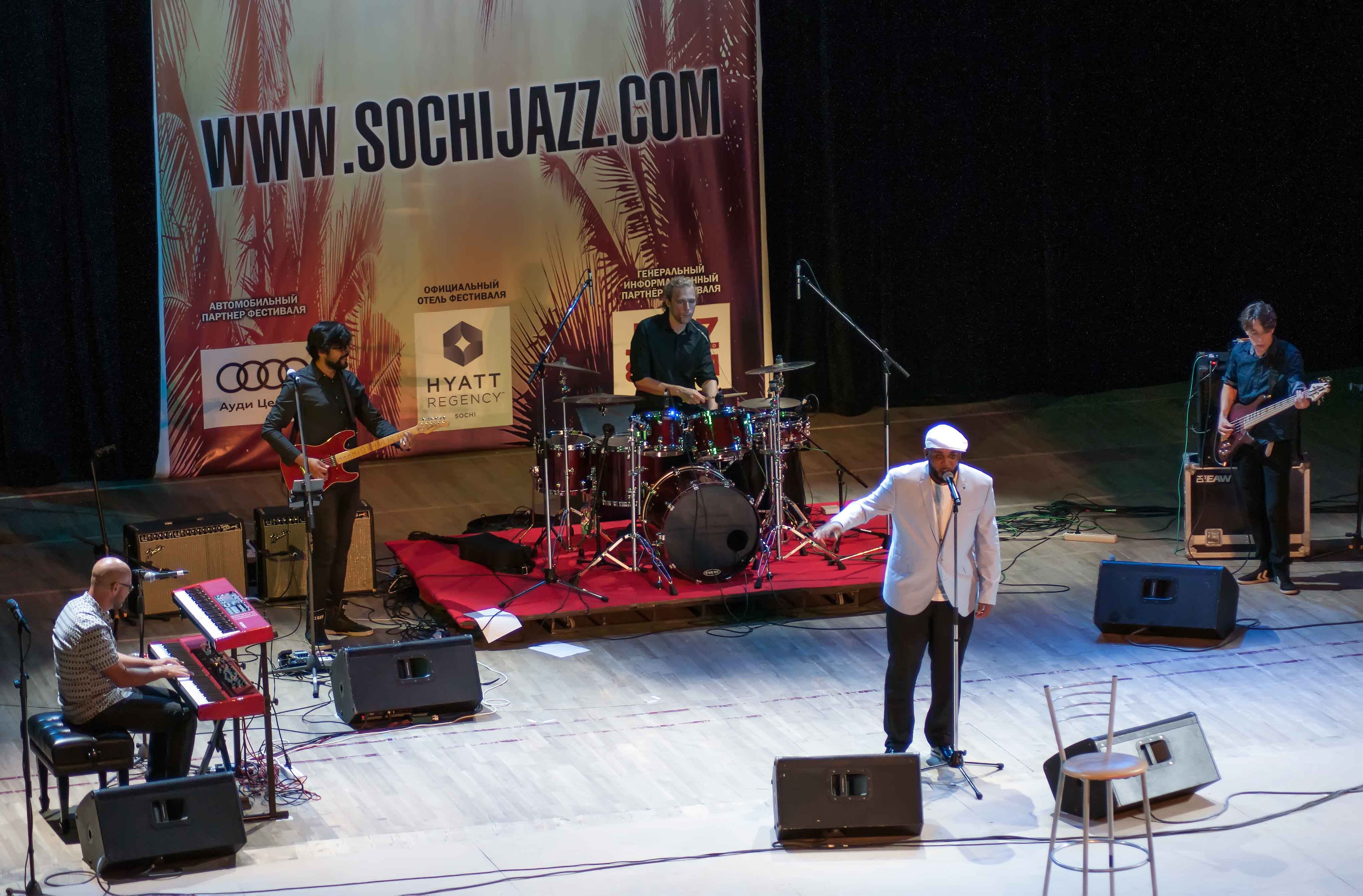 Sochi Jazz Festival